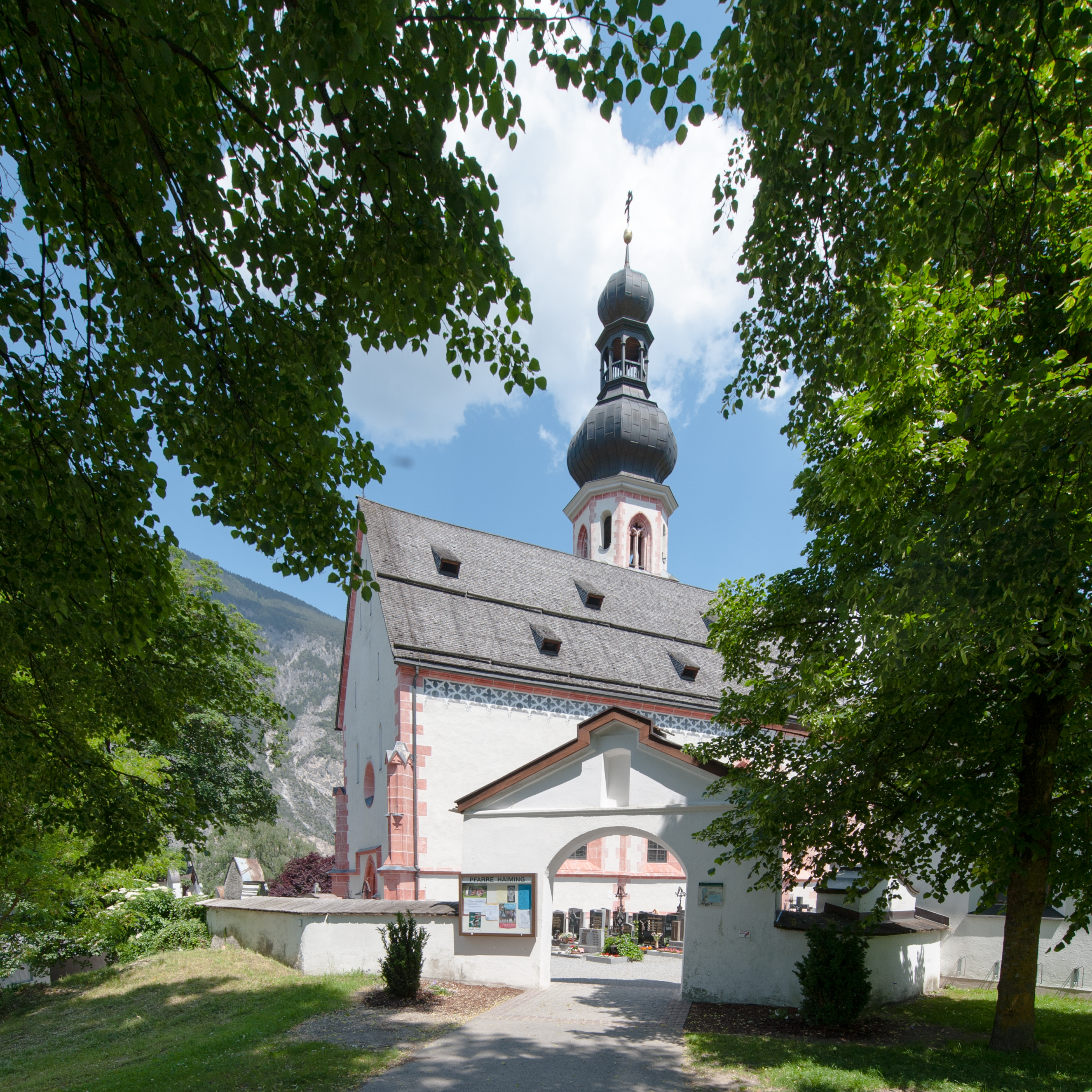 Wiki takes Nordtiroler Oberland: Haiming, Kath. Pfarrkirche hll. Chrysanth und Daria